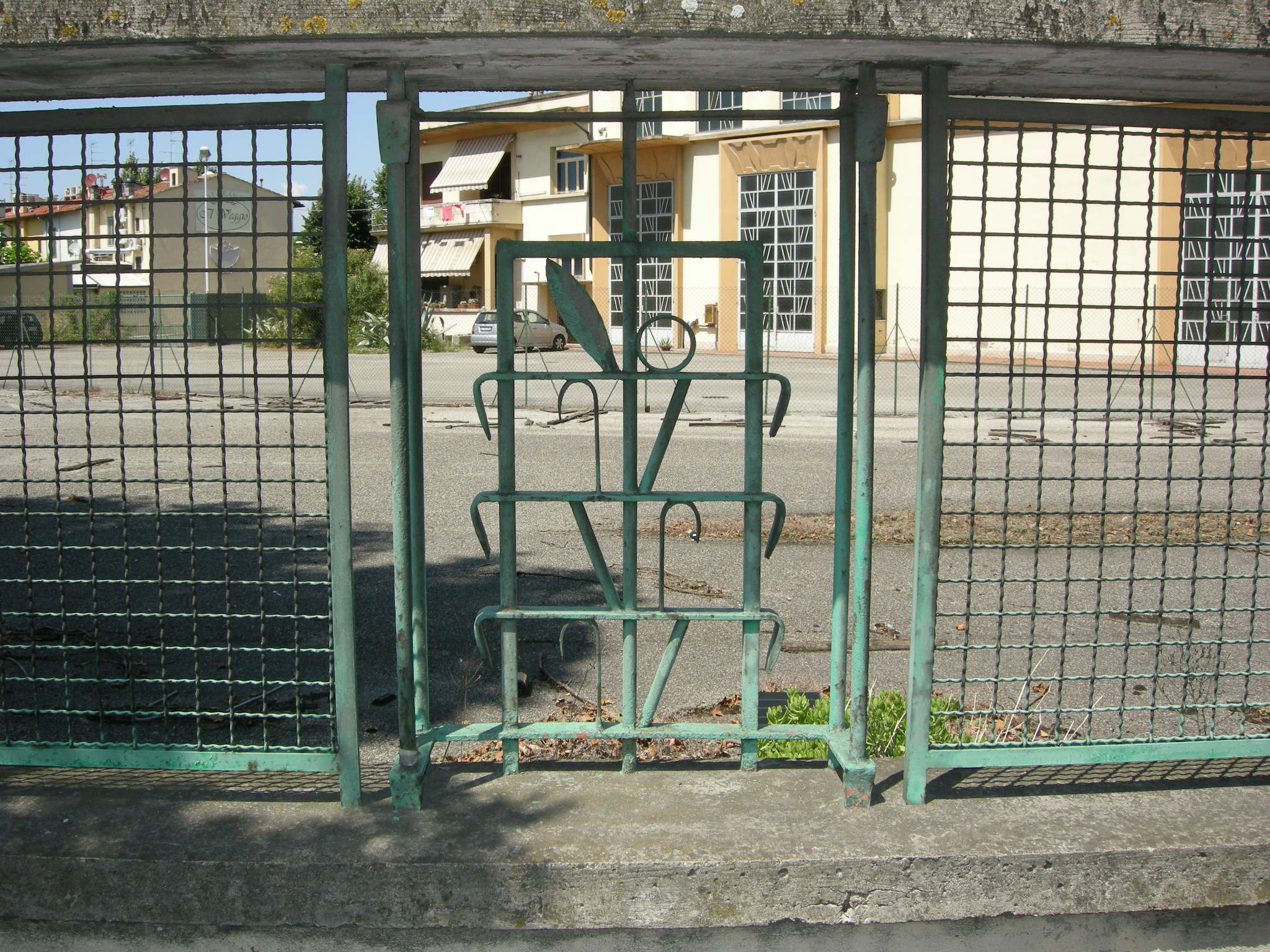 Sottostazione elettrica di peretola, ringhiere